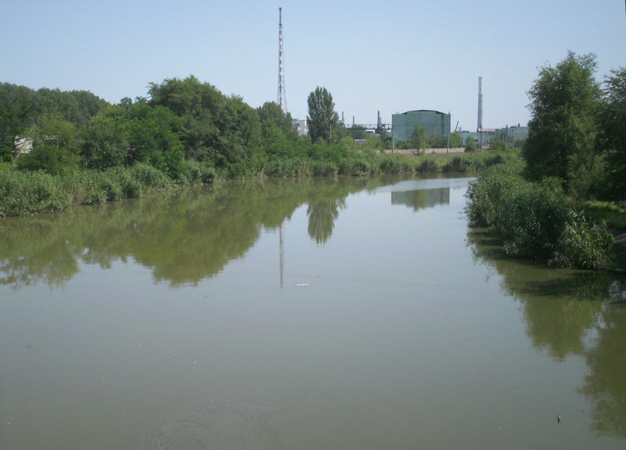 р. Кривий Торець у Костянтинівці